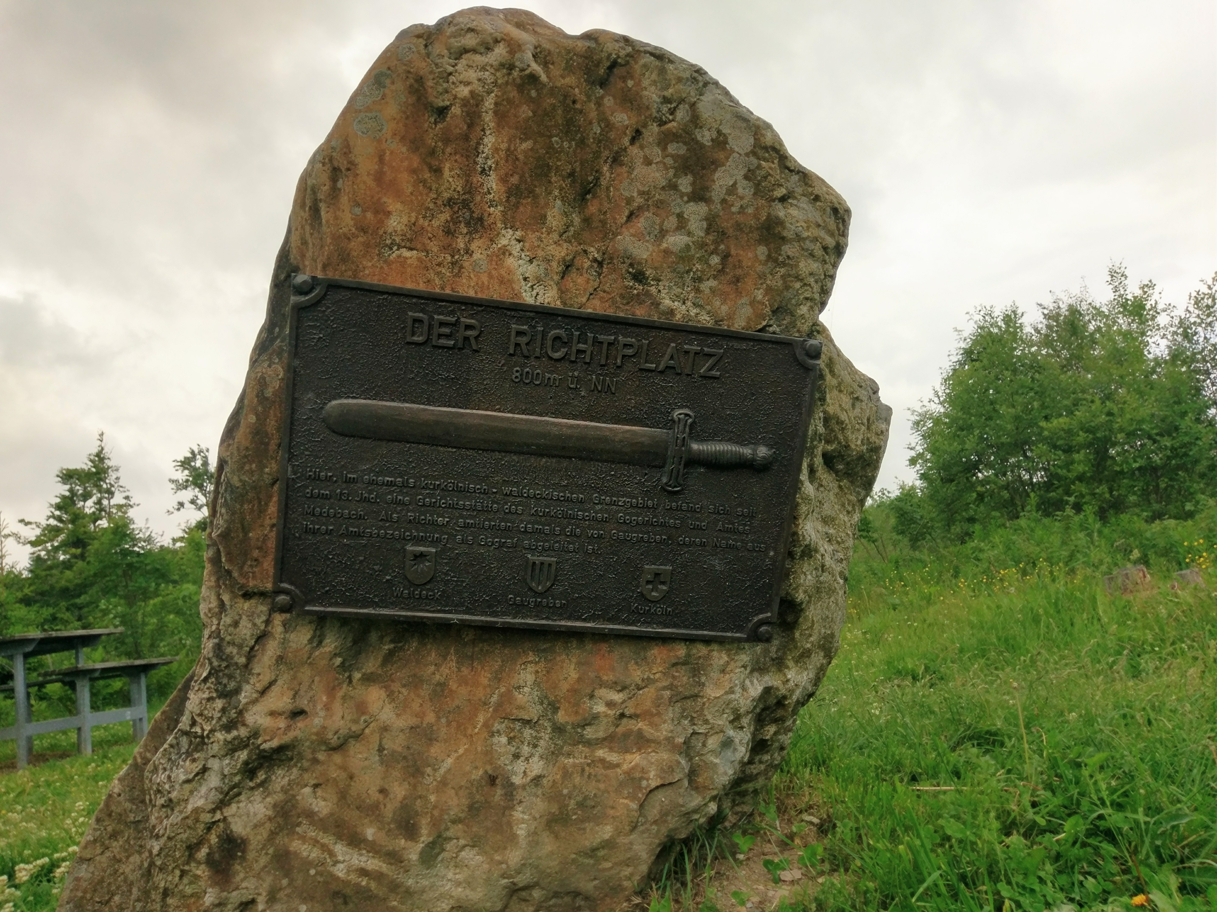 Ehemaliger Richtplatz des Kurkölnischen Gogerichts auf dem Hoppernkopf zwischen Bruchhausen und Willingen, Nordhessen. Inschrift: "Hier, im ehemals kurkölnisch-waldeckischen Grenzgebiet befand sich seit dem 13. Jhd. eine Gerichtsstätte des kurkölnischen Gogerichtes und Amtes Medebach. Als Richter amtierten damals die von Gaugreben, deren Name aus ihrer Amtbezeichnung als Gograf abgeleitet ist."